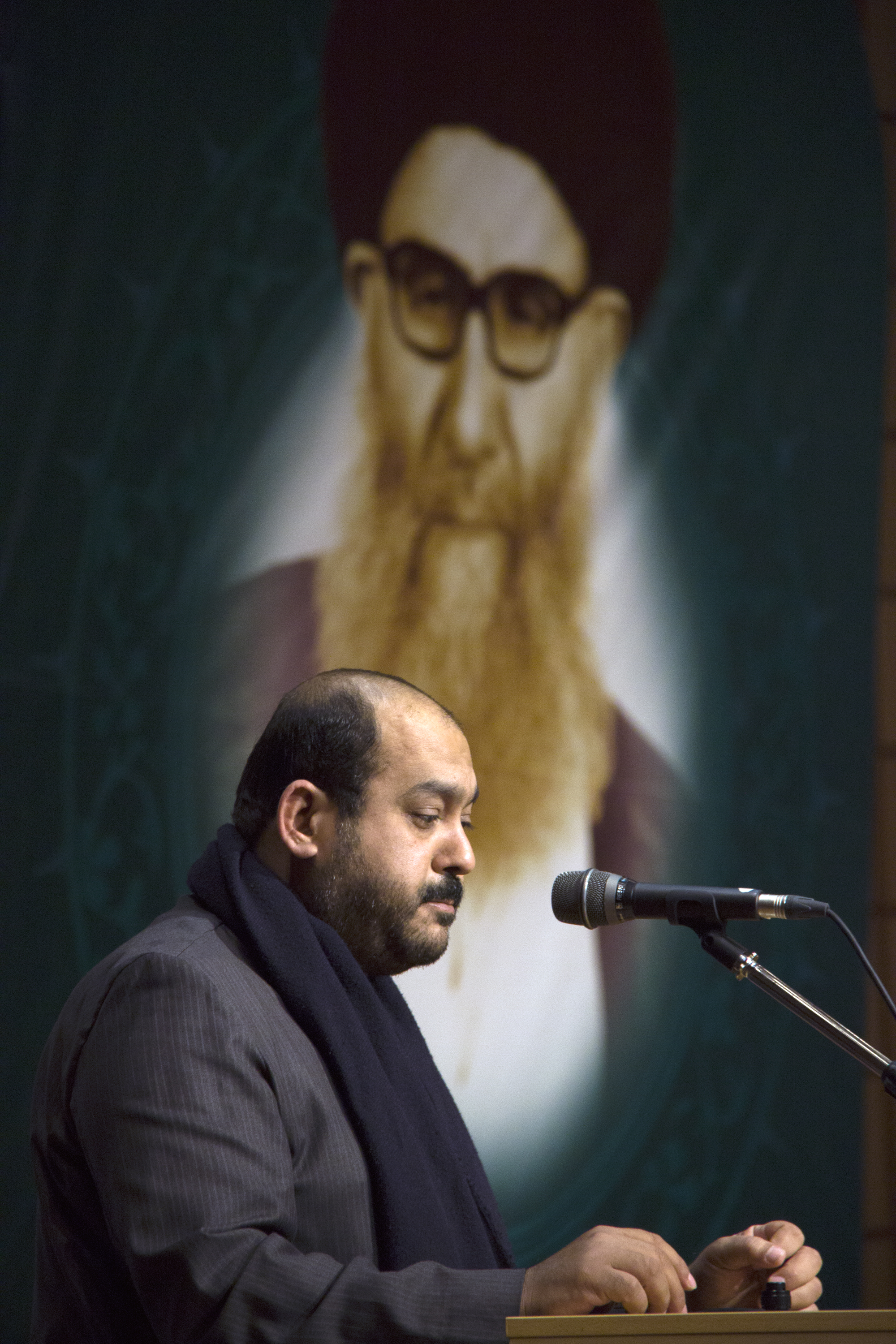 کریم منصوری (زاده ۱۳۴۷ در آبادان)، حافظ و قاری قرآن اهل ایران است.